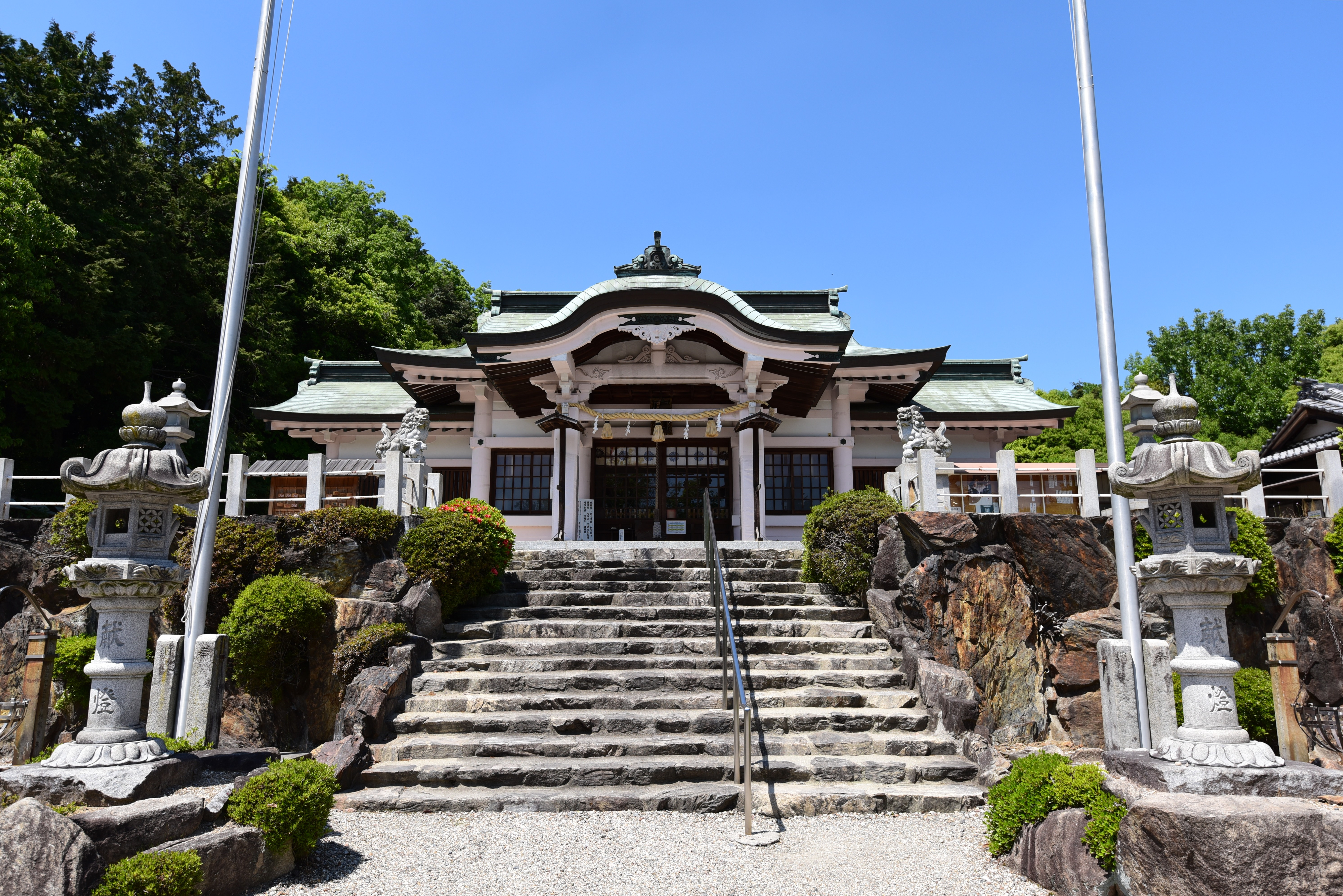 富士浅間神社 (東郷町)